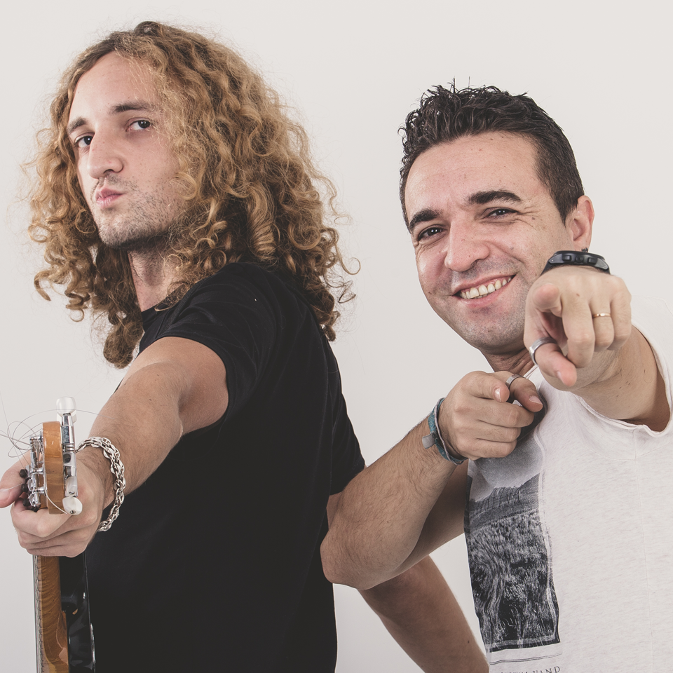 Os irmãos, David e André Antunes.